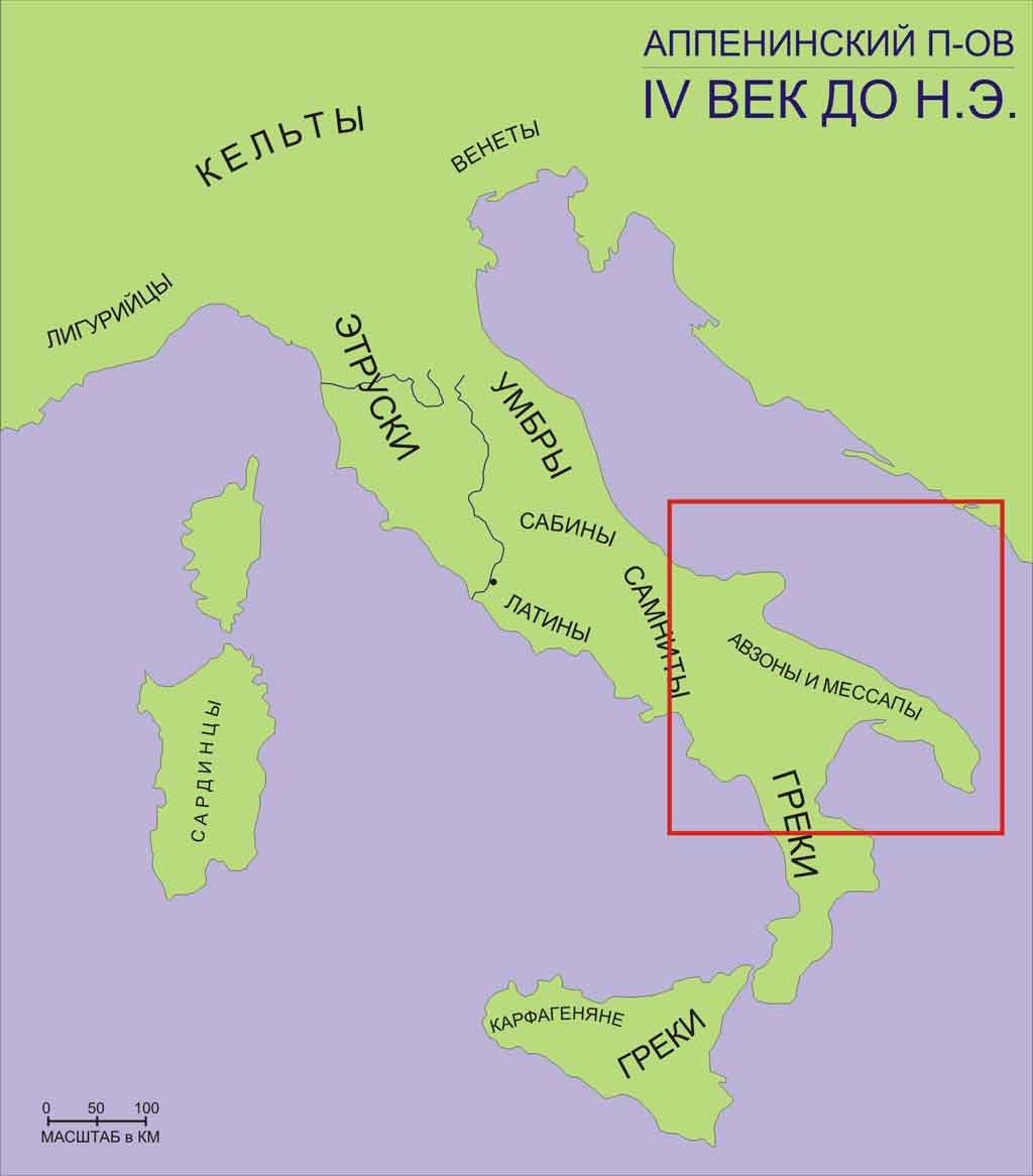 племена авзонов и мессапов в Италии IV века до Н.Э.